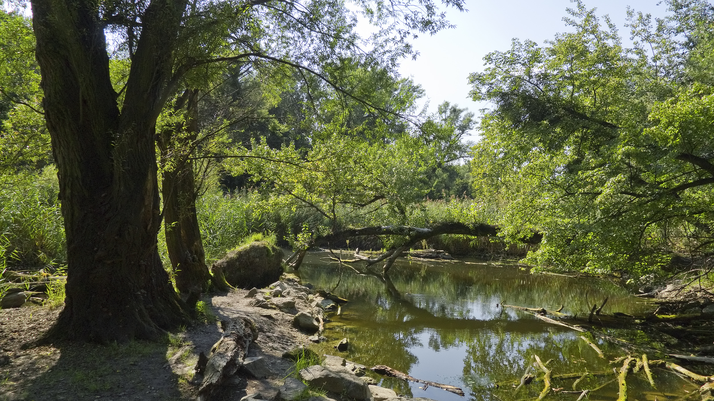 Wiener Prater, Mauthnerwasser This media shows the natural monument in Vienna with the ID 646.